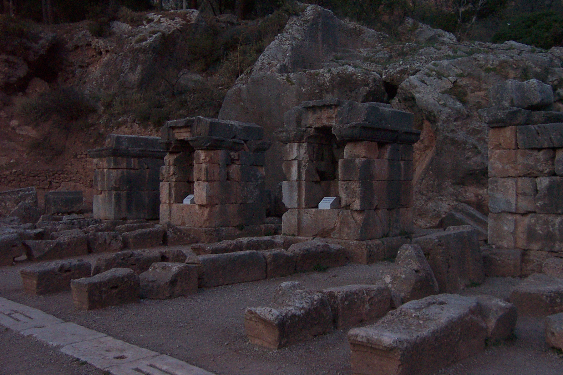 Estadio de Delfos